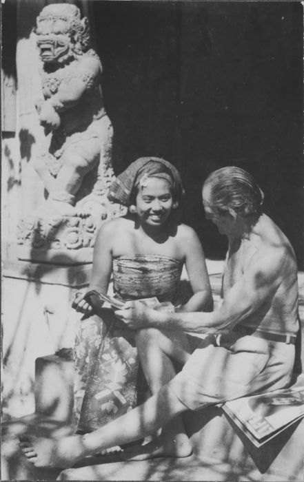 foto. De Belgische kunstschilder Le Mayeur de Merprès met zijn vrouw en model Ni Pollok